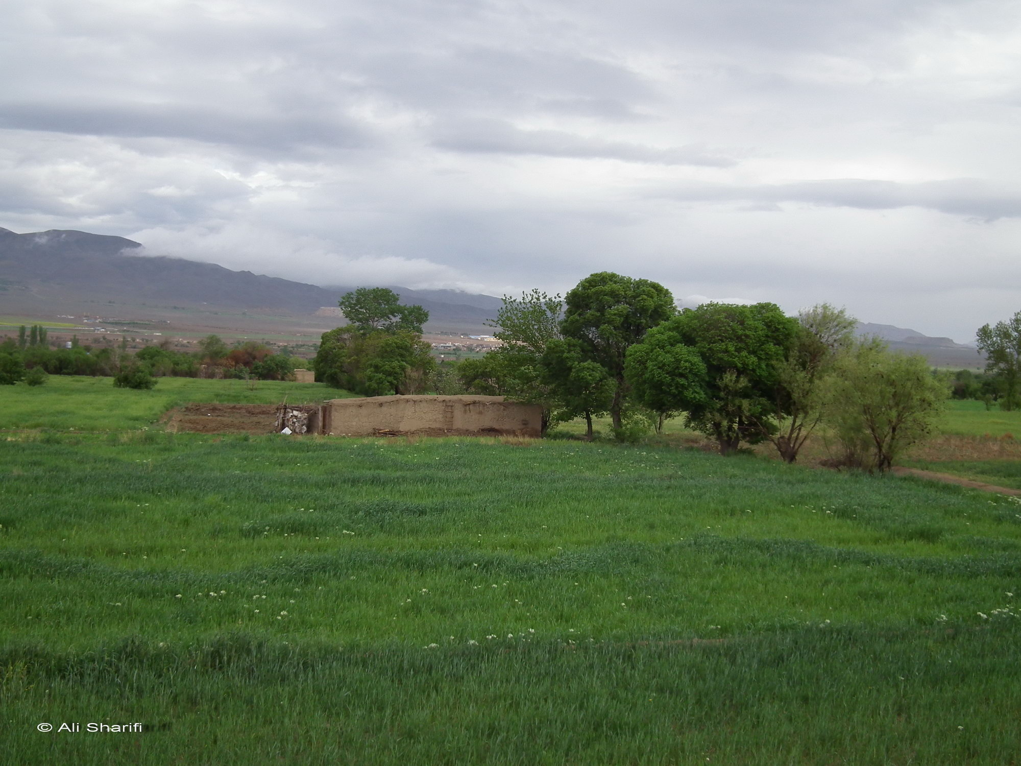 طبیعت زیبای نیمور